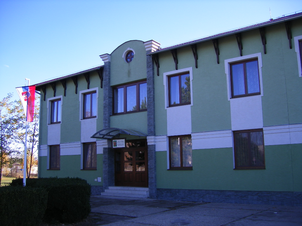 Csilizradvány - községi hivatal